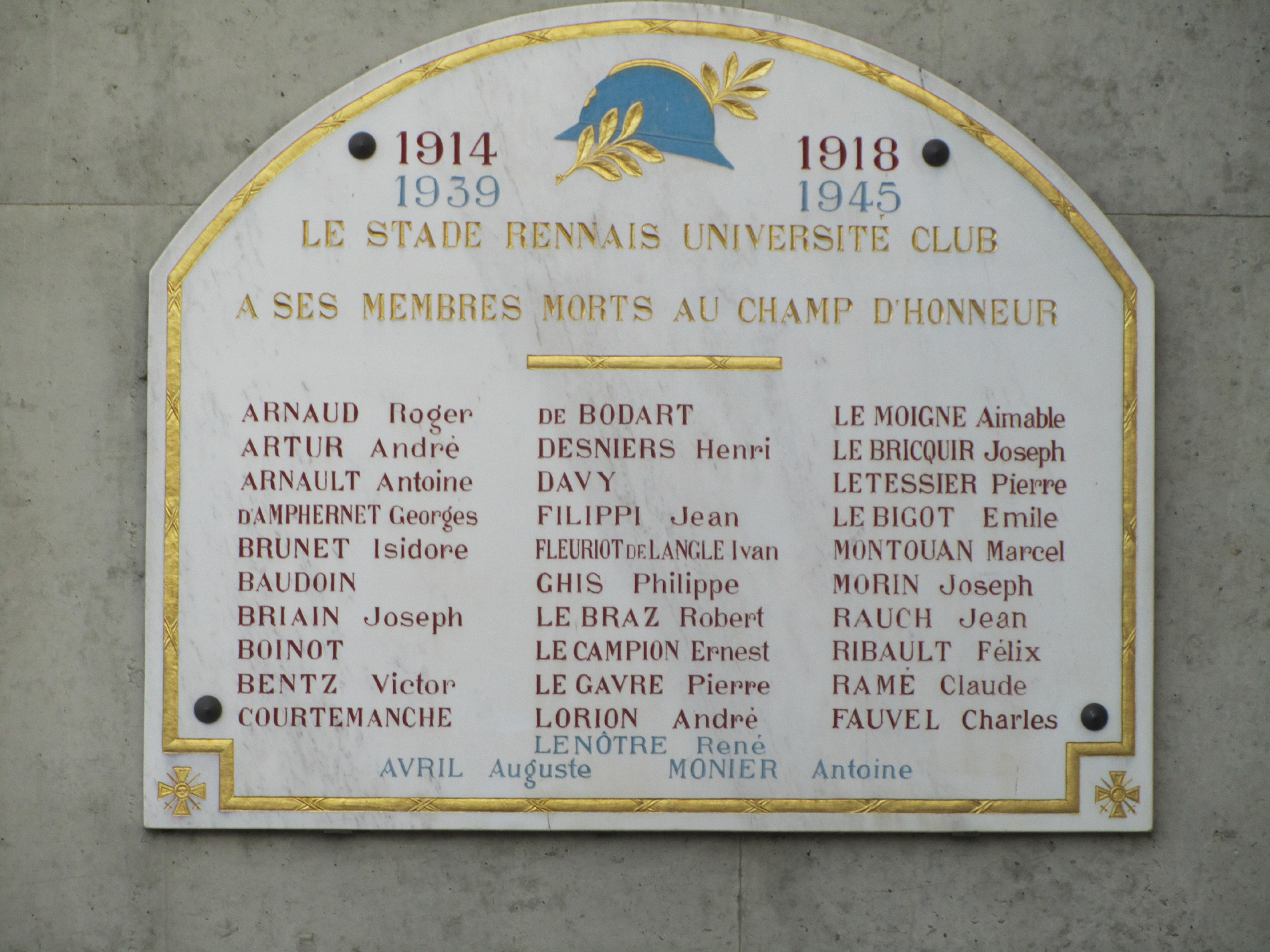 Plaque commémorative à la mémoire des membres du Stade rennais UC morts durant la Première Guerre mondiale, visible au stade de la route de Lorient.